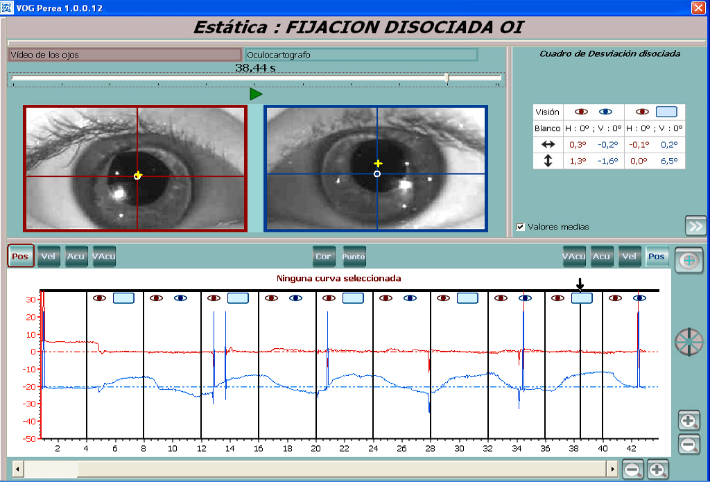 Mismo paciente. Al ocluir el OI hay elevación lenta (de flotación) de este ojo que desciende incluso por debajo de la línea de base al desocluirle.